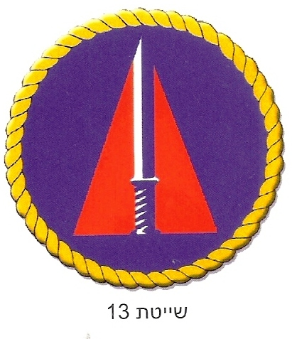 סמל שייטת 13